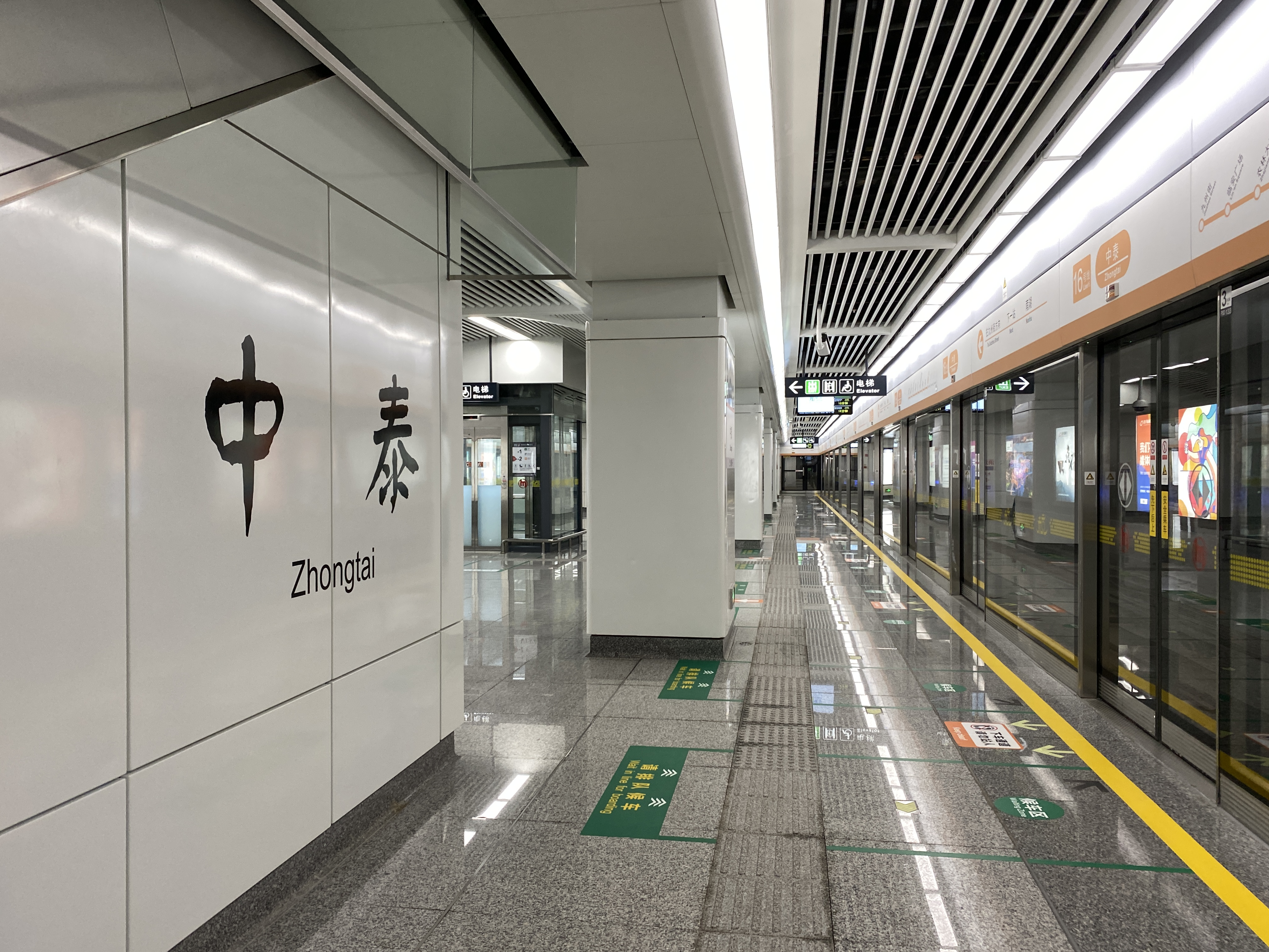 中泰站站台